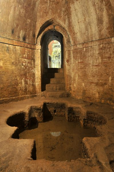 Sala ottagonale piccola